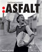 Forsidebilde av Gatemagasinet ASFALT som kommer for salg 1. april 2009.